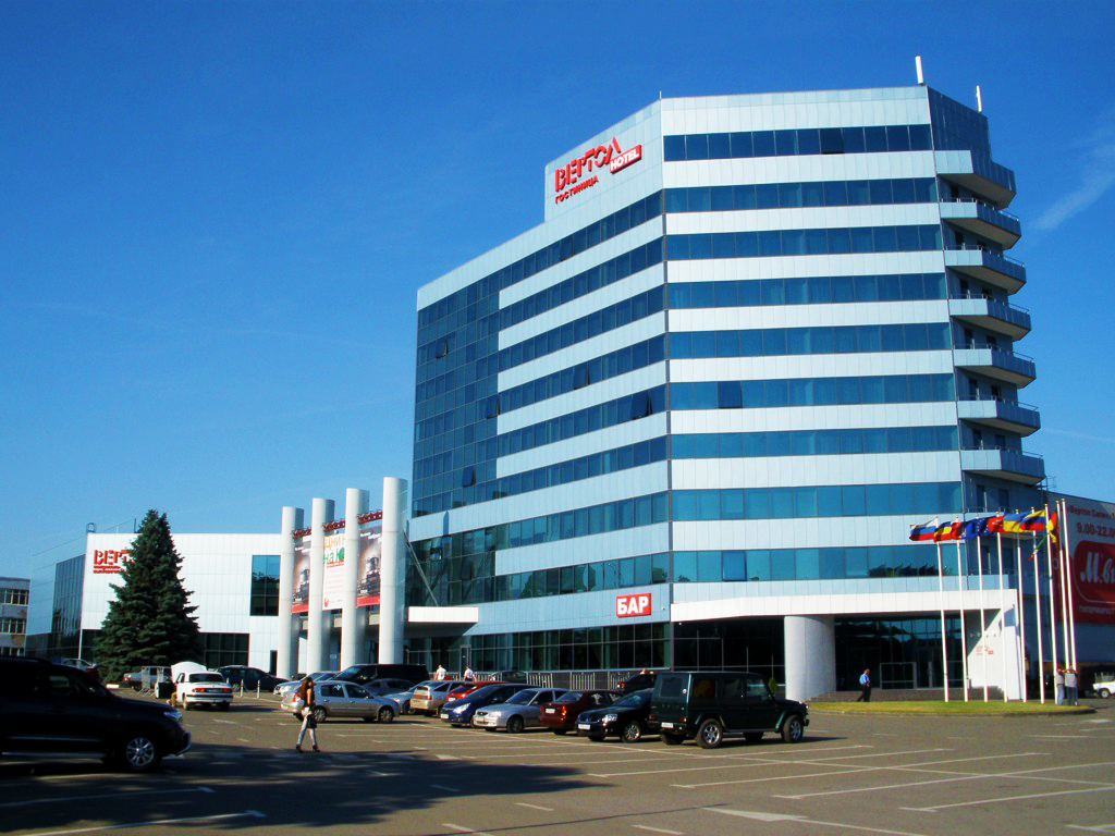 Вертол сити, Ростов-на-Дону